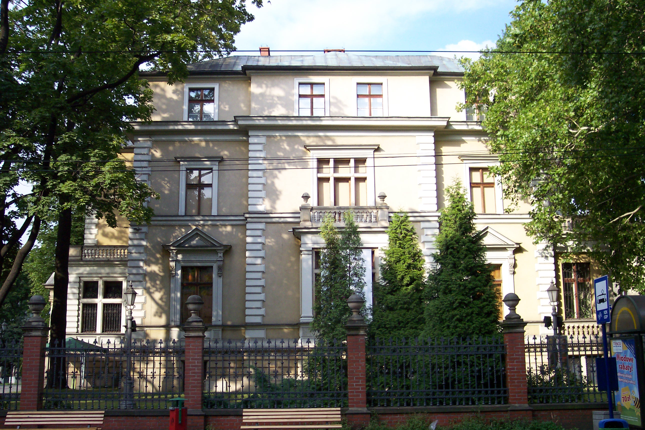 Willa Caro w Gliwicach